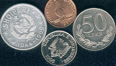 Die zwei Münzen von links werden heute nicht mehr benutzt. Es gibt noch ne 10'er Münze und noch ne 20'er münze (Original text : Albanische Kursmünzen)